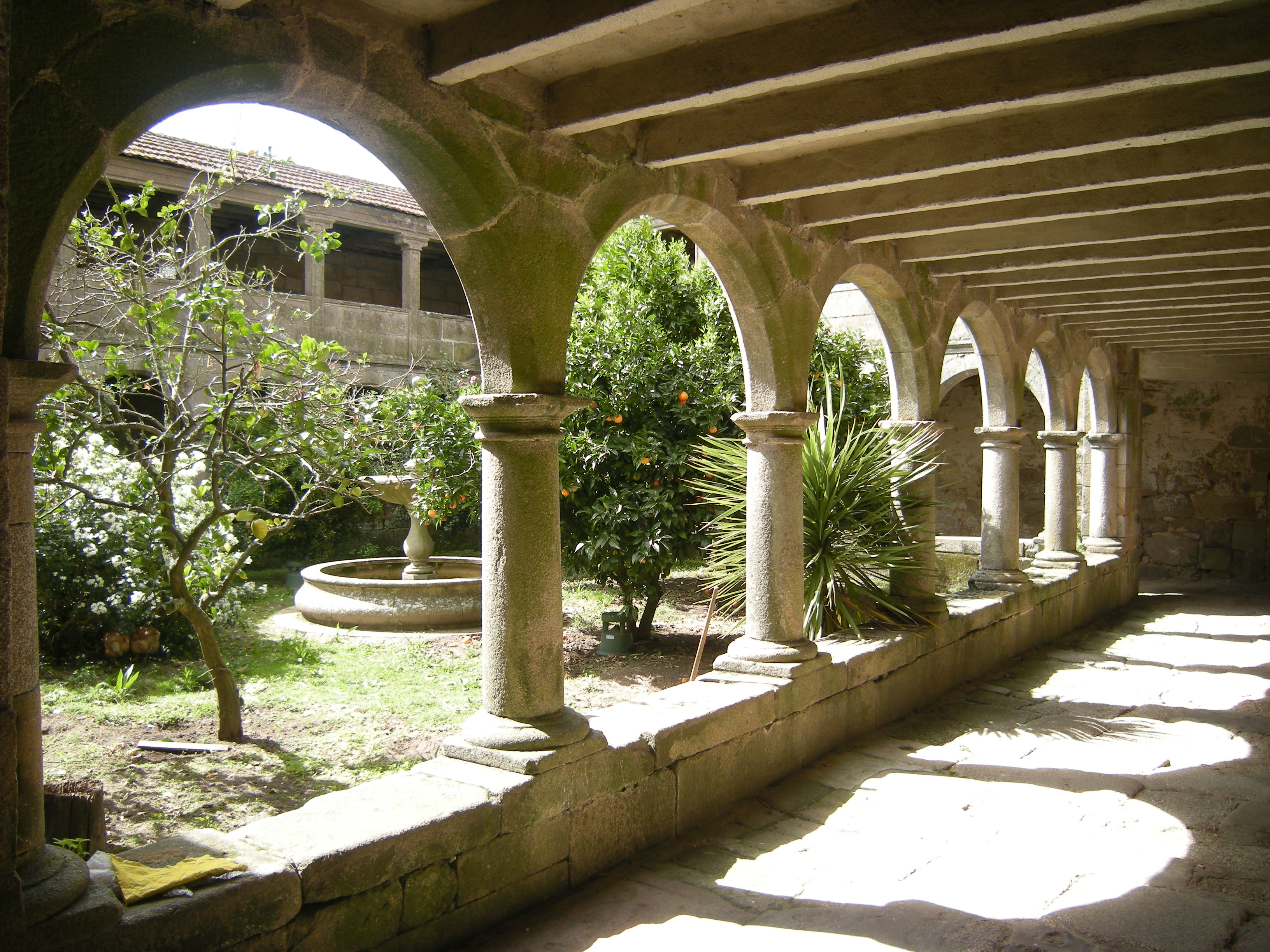 Claustro do antigo monasterio de San Pedro de Tenorio, Cotobade